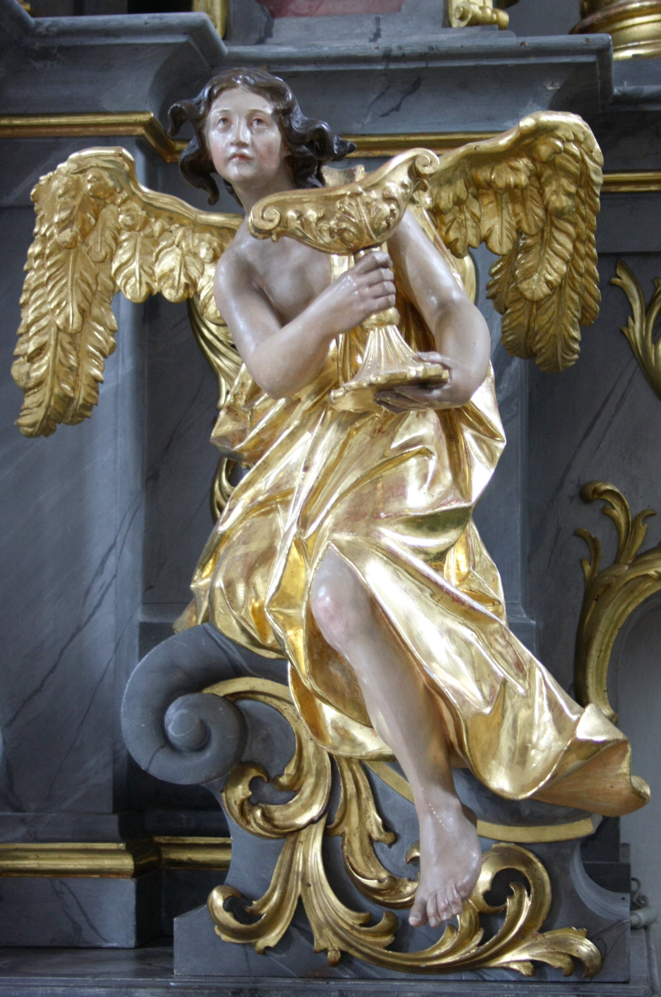 Katholische Kirche St. Andreas in Gremheim, einem Ortsteil von Schwenningen (Donau), Engel am Hauptaltar